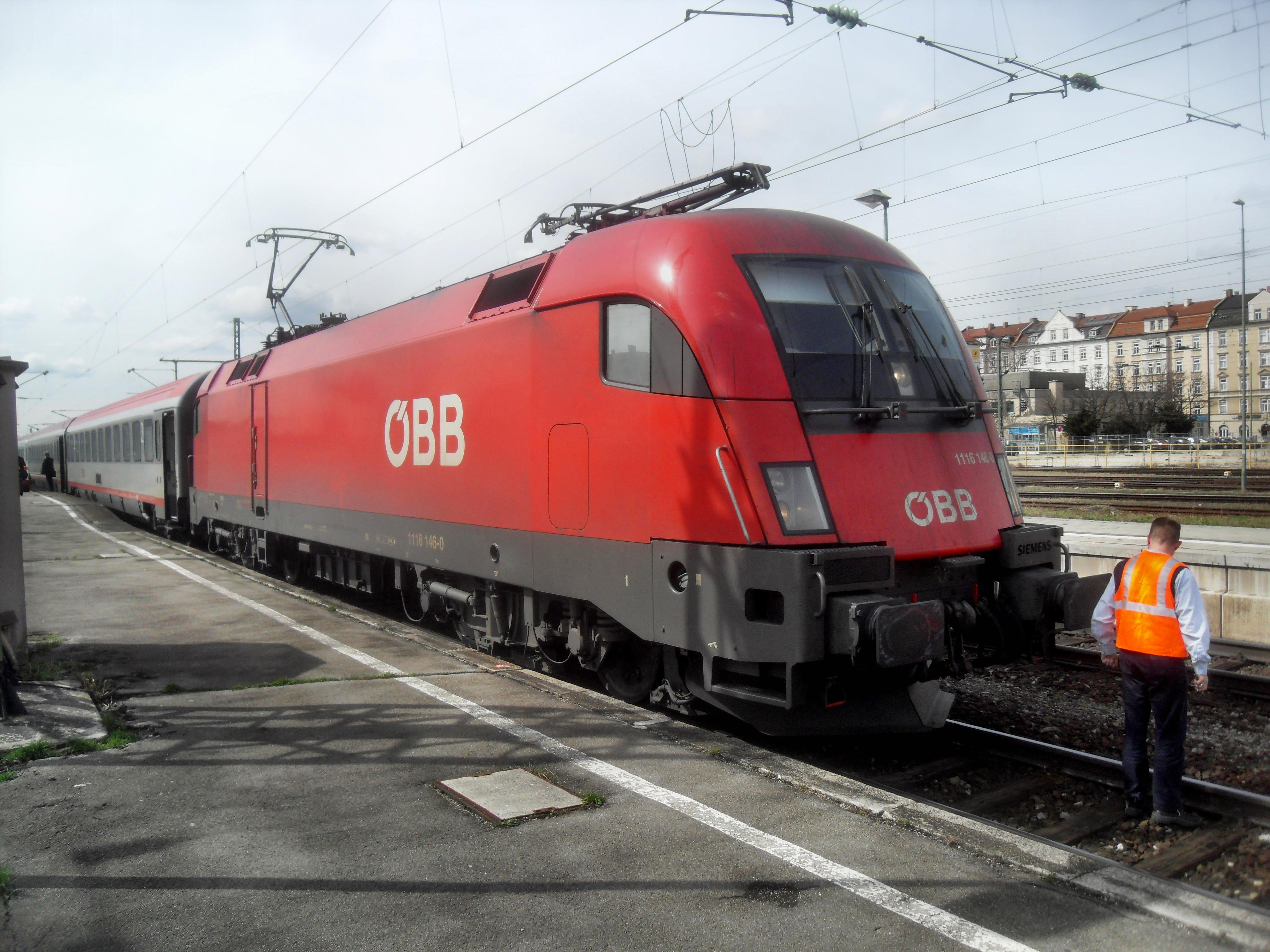 EuroCity mit Elektrolokomotive der ÖBB-Baureihe 1116 (Siemens ES64U2, Taurus) auf Gleis 7 des Bahnhofs München Ost in München in Bayern (Deutschland) auf dem Weg nach Klagenfurt am Wörthersee in Österreich